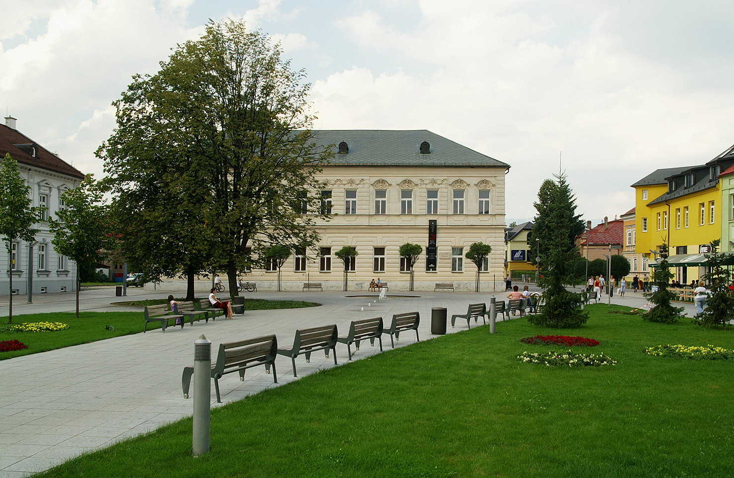 Martin (SVK) plaza